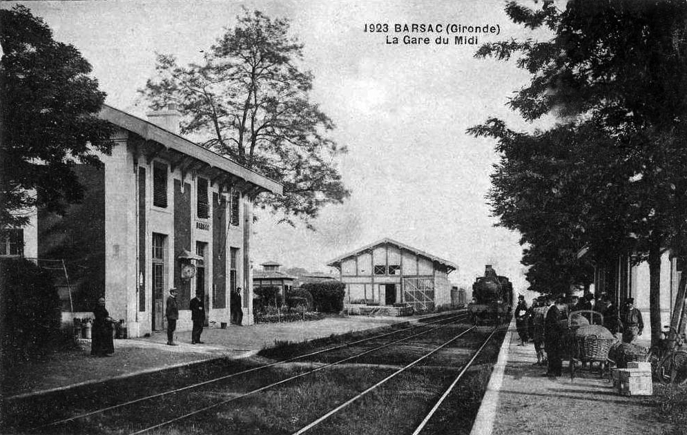 La gare de Barsac au début des années 1920.